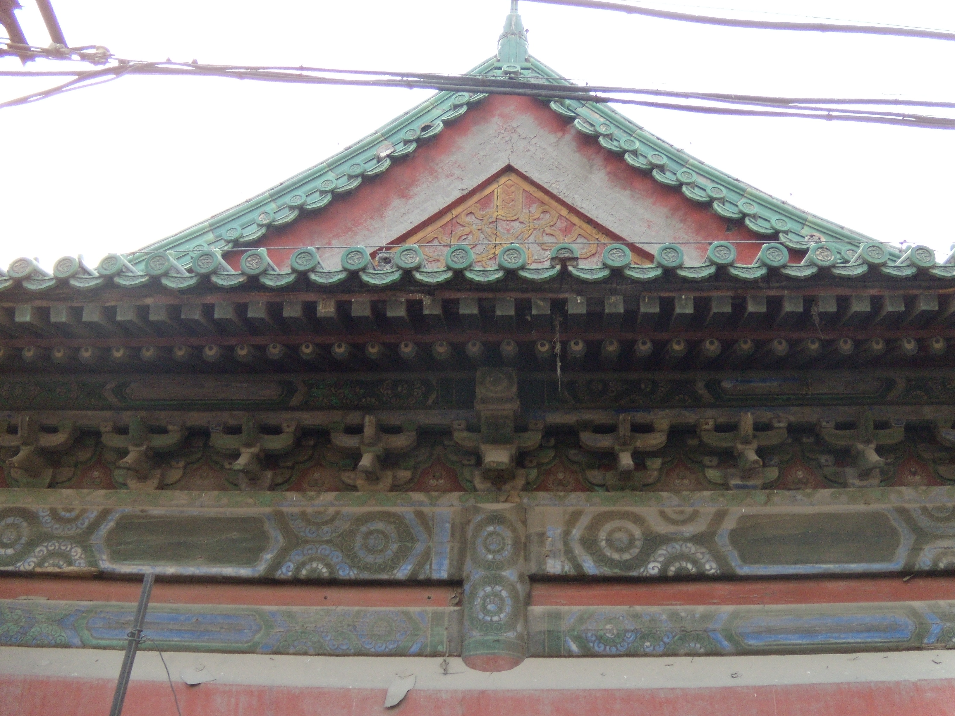 北京护国寺